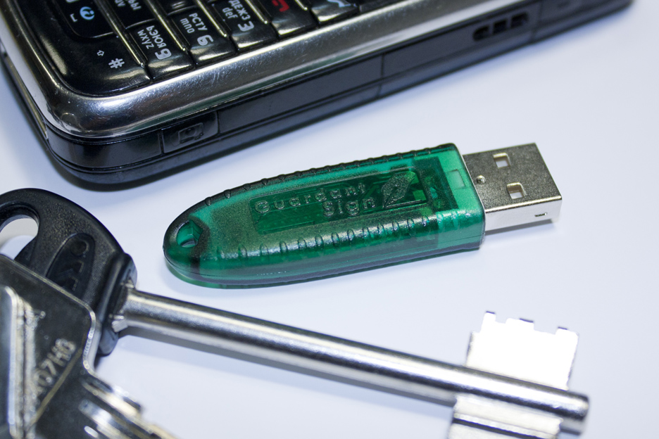 Электронный ключ Guardant Sigm для защиты программного обеспечения от нелегального использования.